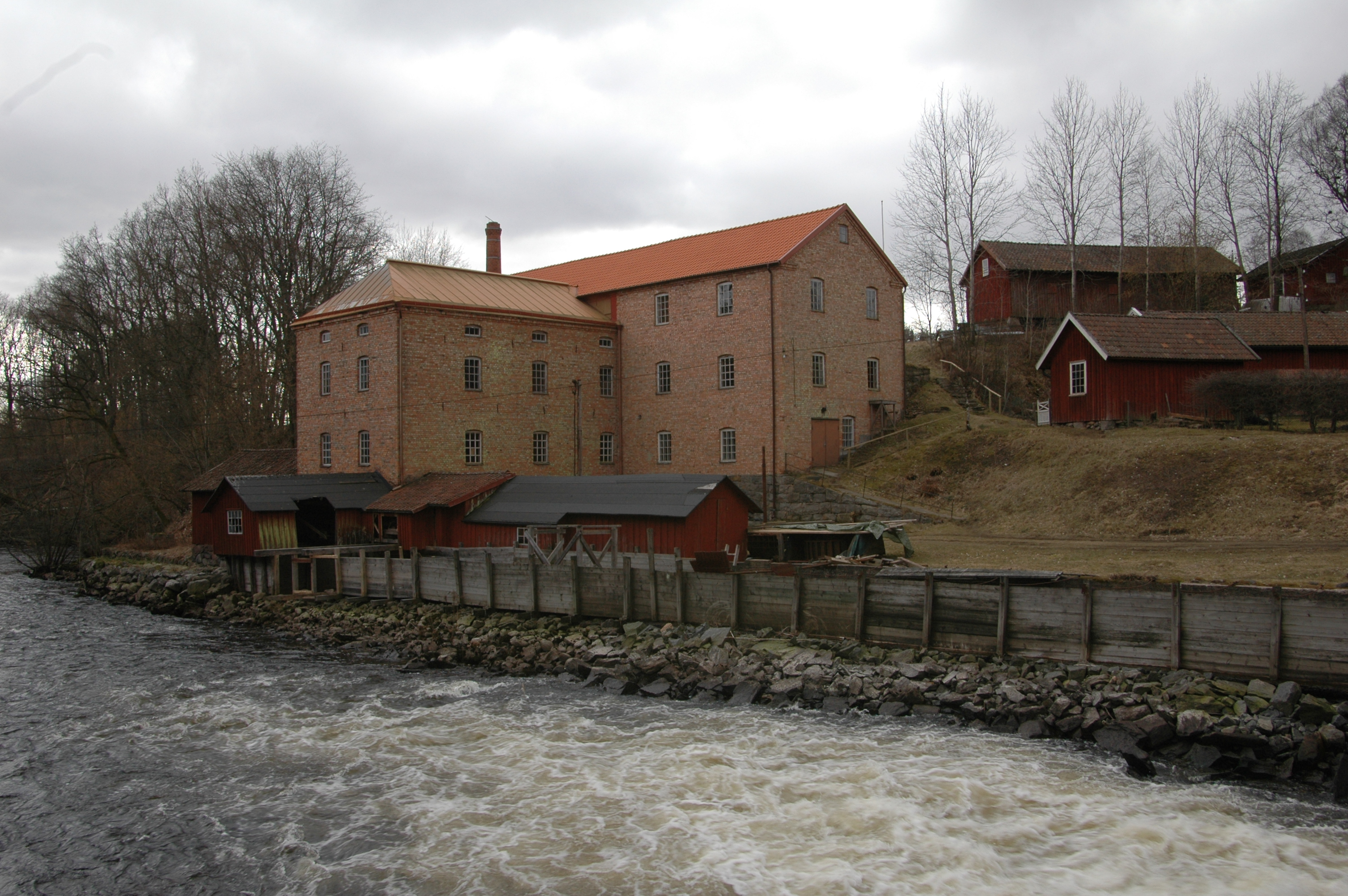 Hillefors grynkvarn (Hunstugan 1:109)